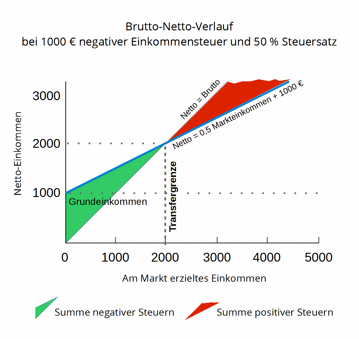 Rechenbeispiel Single Gesamteinkommen = 0,5 Markteinkommen + Grundeinkommen